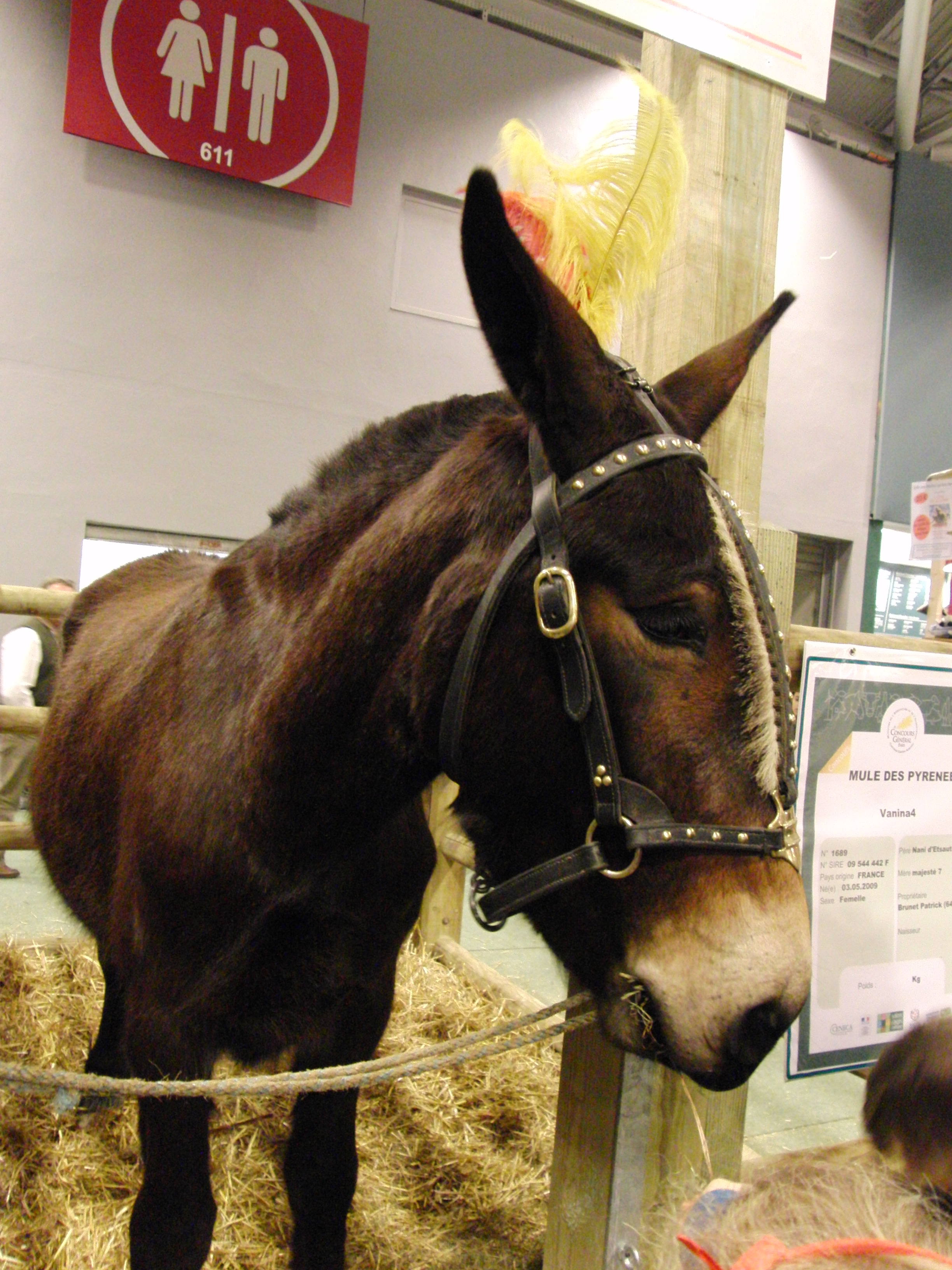 Tête d'une mule des Pyrénées - Salon international de l'agriculture 2013, Paris, France